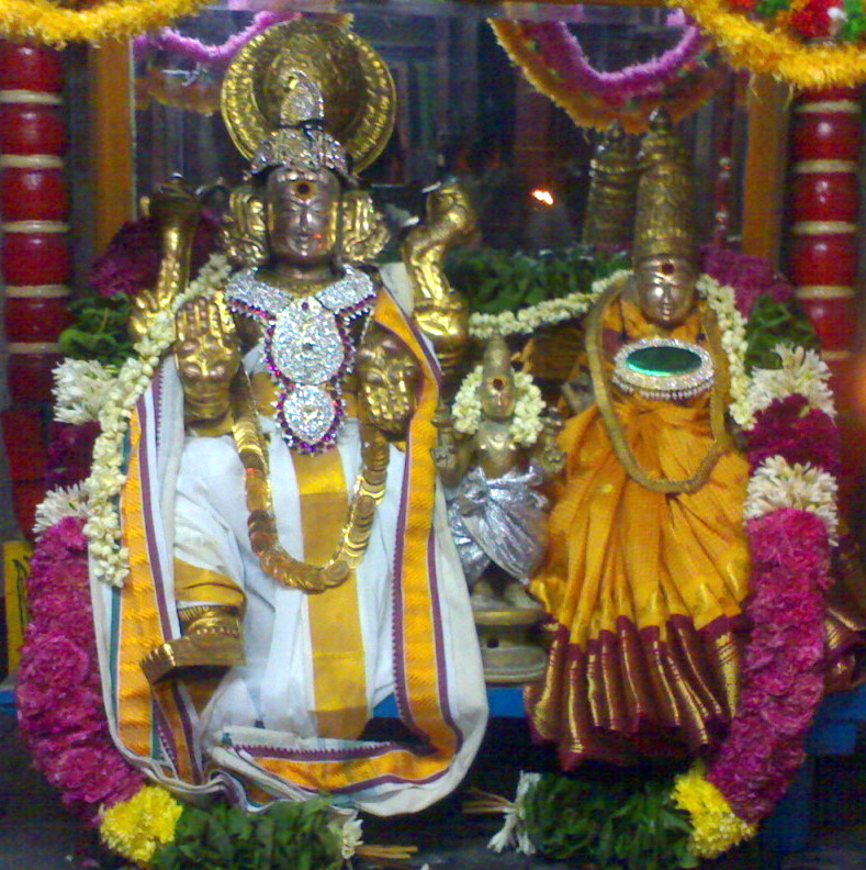 அருள்மிகு காமாட்சி அம்பிகா சமேத நாகேஸ்வர சுவாமிகள் (சோமாஸ் கந்தா), வட திருநாகேஸ்வர: ம்Somaskanda/samedha nageswara and kamaatchi of north thirunageswaram